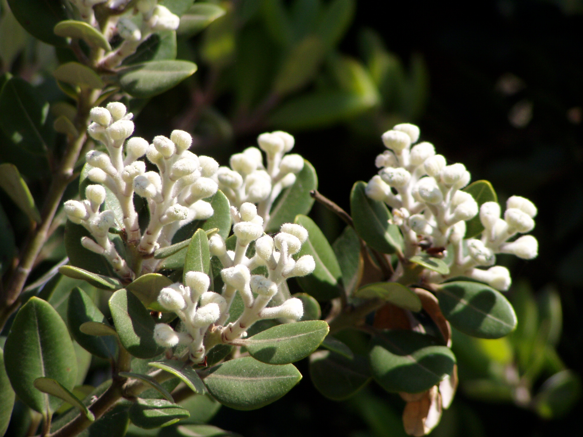 Metrosideros excelsa Sol. ex Gaertn.